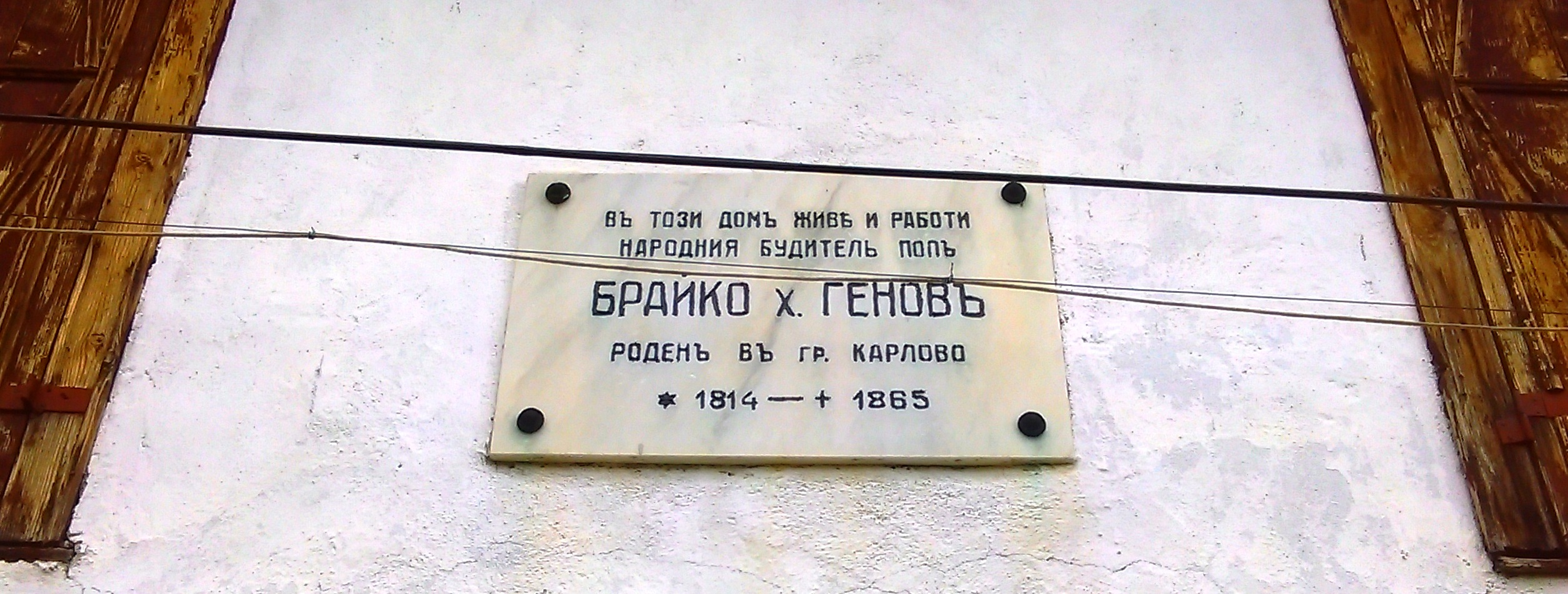 Мемориална плоча на къщата на Брайко Хаджигенов в Карлово